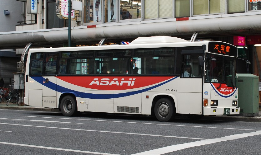 朝日バス2134号車。熊谷駅そばの公道上より撮影。